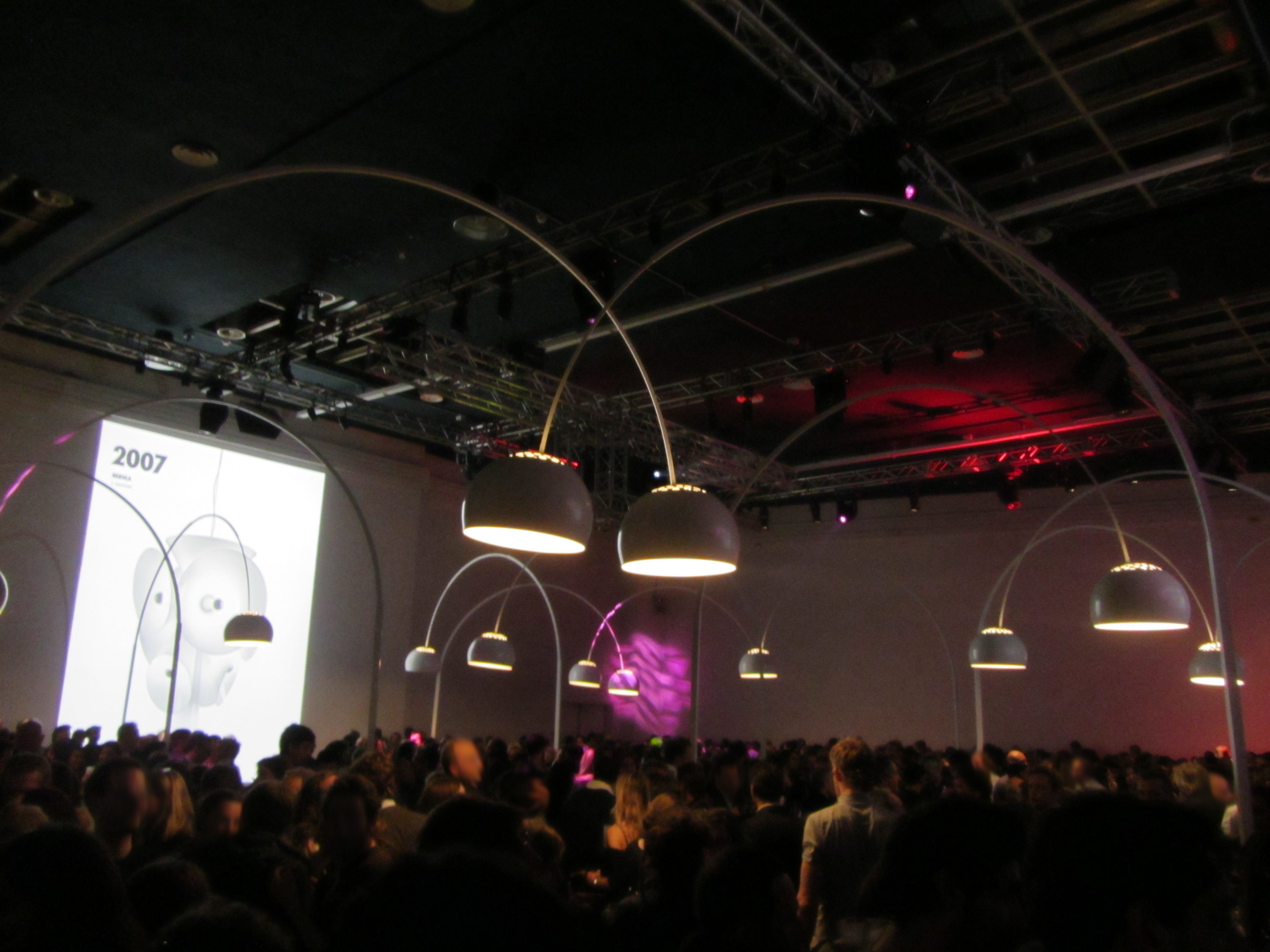 Festa dei 50 anni della FLOS Evento tenutosi durante il Fuorisalone 2012 (Milan Design Week) presso il Palazzo della Permanente a Milano in Italia. Evento chiuso (su invito) Open Bar, Dj set, catering ed esposizione di tutte le lampade FLOS (anche quelle fuori produzione) dal 1962 al 2012.